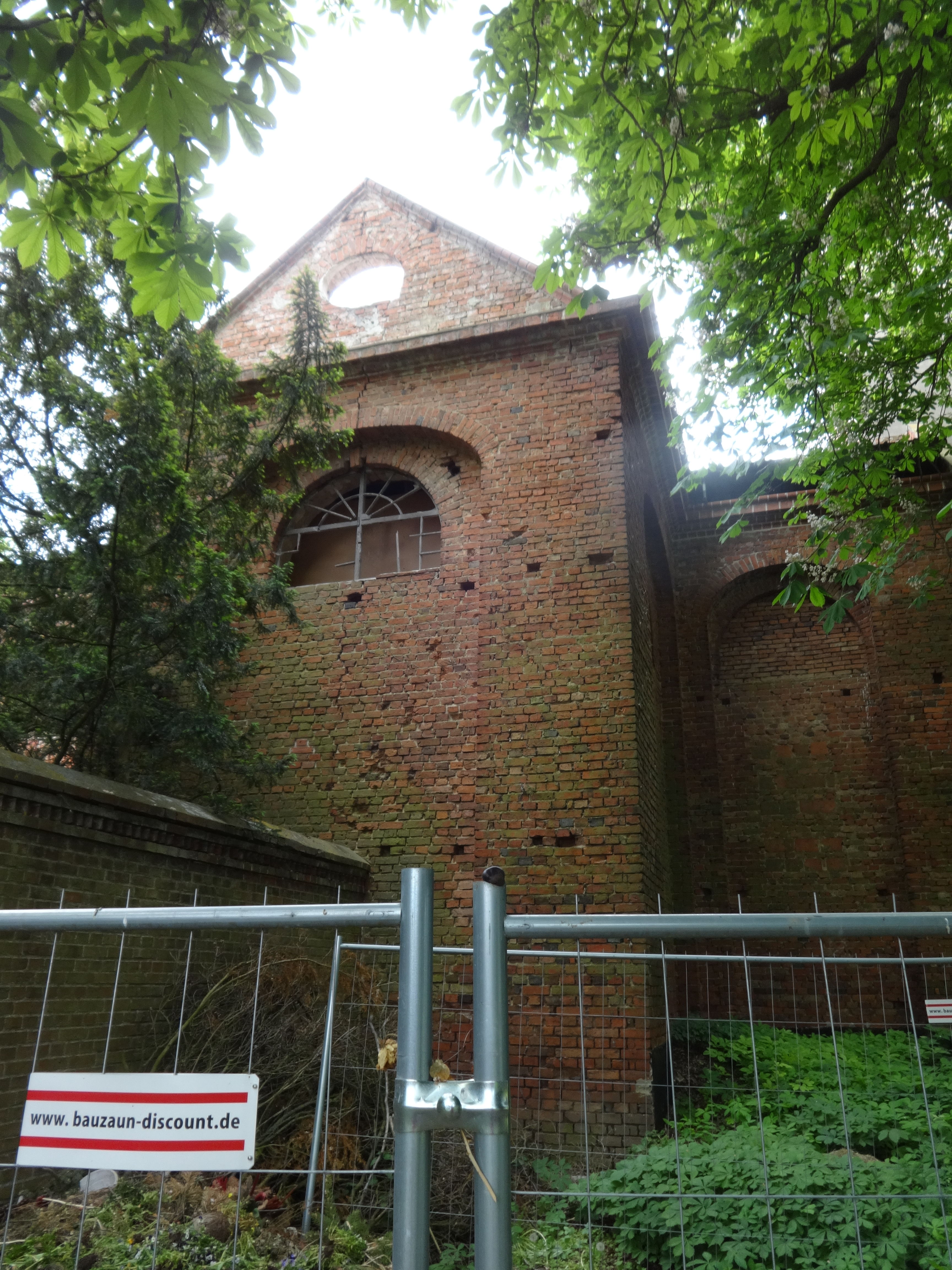 Die Dorfkirche in Hohenjesar ist eine Saalkirche, die in den Jahren 1721 bis 1723 auf dem Fundament eines mittelalterlichen Vorgängerbaus entstand. Im Zweiten Weltkrieg wurde das Bauwerk stark beschädigt und verfiel in den darauffolgenden Jahrzehnten. Zwar konnte die Kirchengemeinde den Turm im Jahr 1965 instandsetzen, das Dach wurde jedoch abgetragen und 2007 durch ein Notdach ersetzt. Seit Anfang des 21. Jahrhunderts bemüht sich ein Heimatverein um die Wiederherstellung.